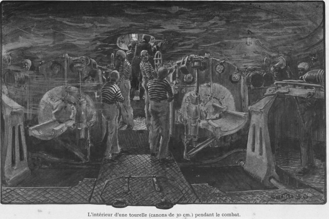 Intérieur d'une tourelle d'un cuirassé pendant le tir de canons de 300 mm. Dessin réalisé en 1910.